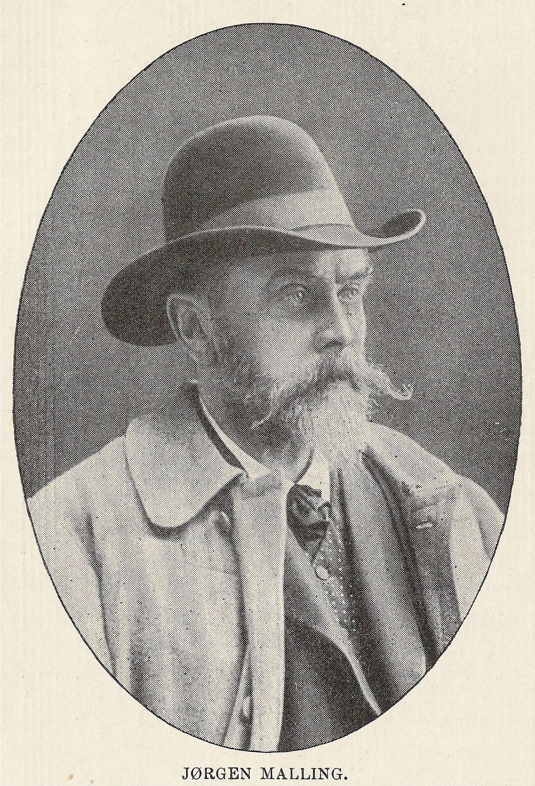 Dansk komponist og musikpædagog (1836-1905) Danish composer and musicteacher (1836-1905)